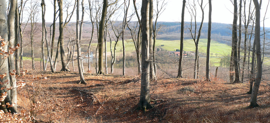 Reitlingstal mit Großem Teich und Weidehof (früher Vorwerk) als Blick hinunter vom Burgberg